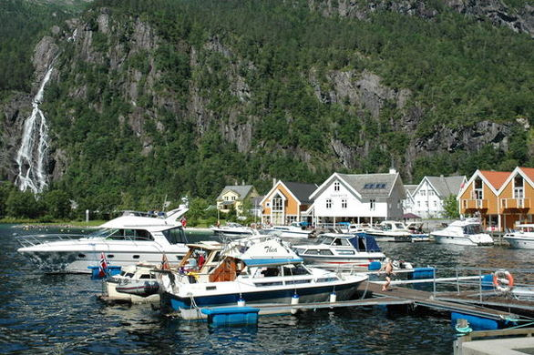 Mo i Modalen